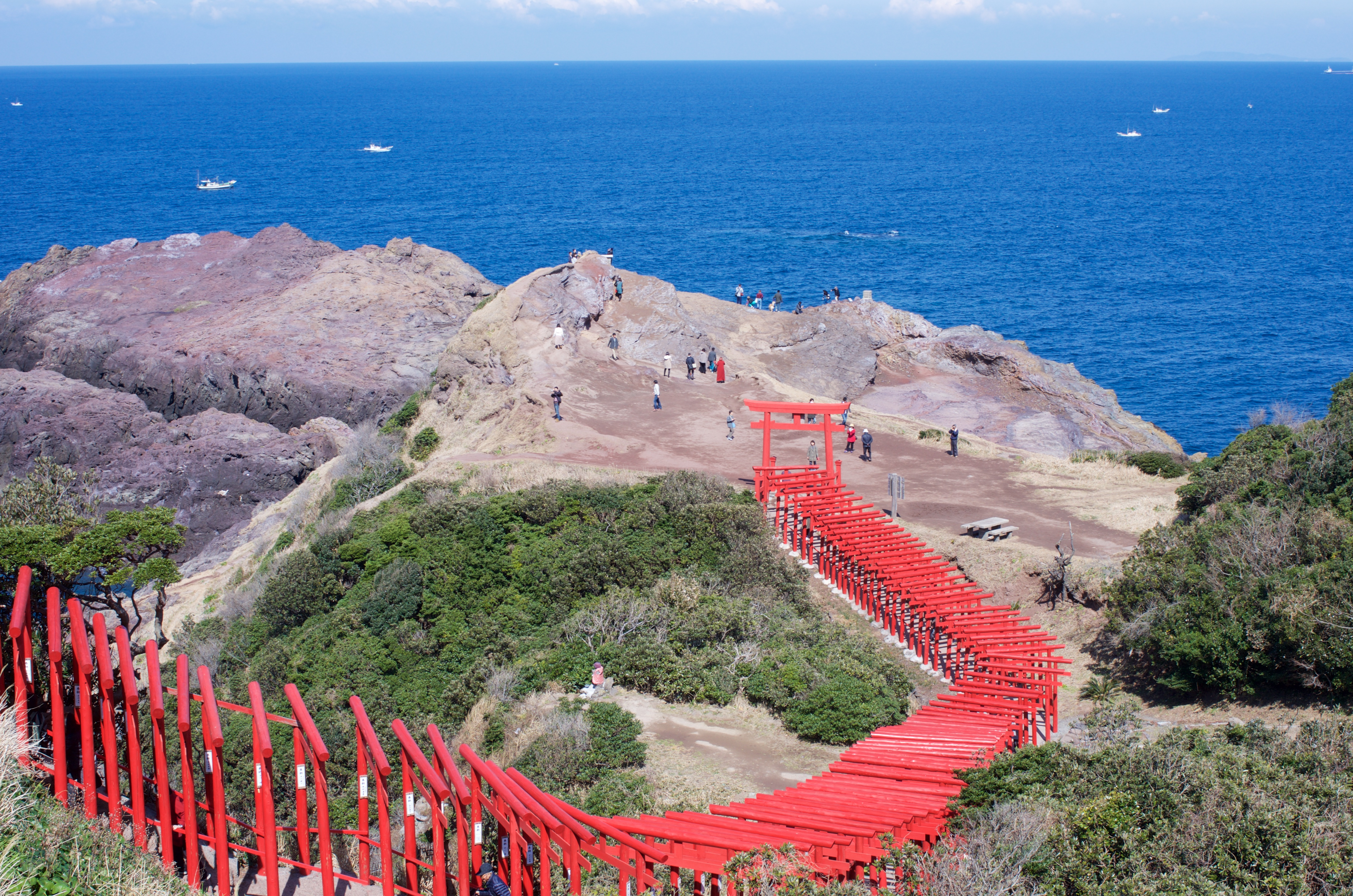 山口県長門市油谷津黄498 「元乃隅稲成神社」